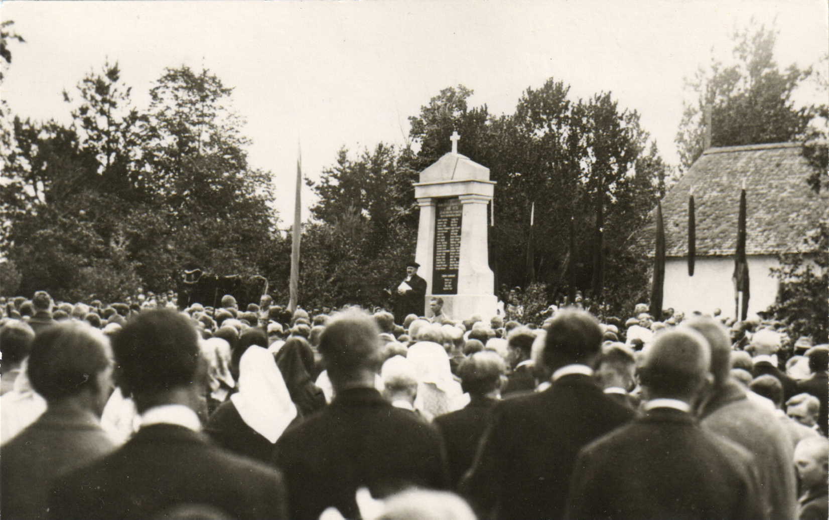 Mälestussammas sõjas langenud Kose kihelkonna meestele. Kõneleb praost Harald Põld.